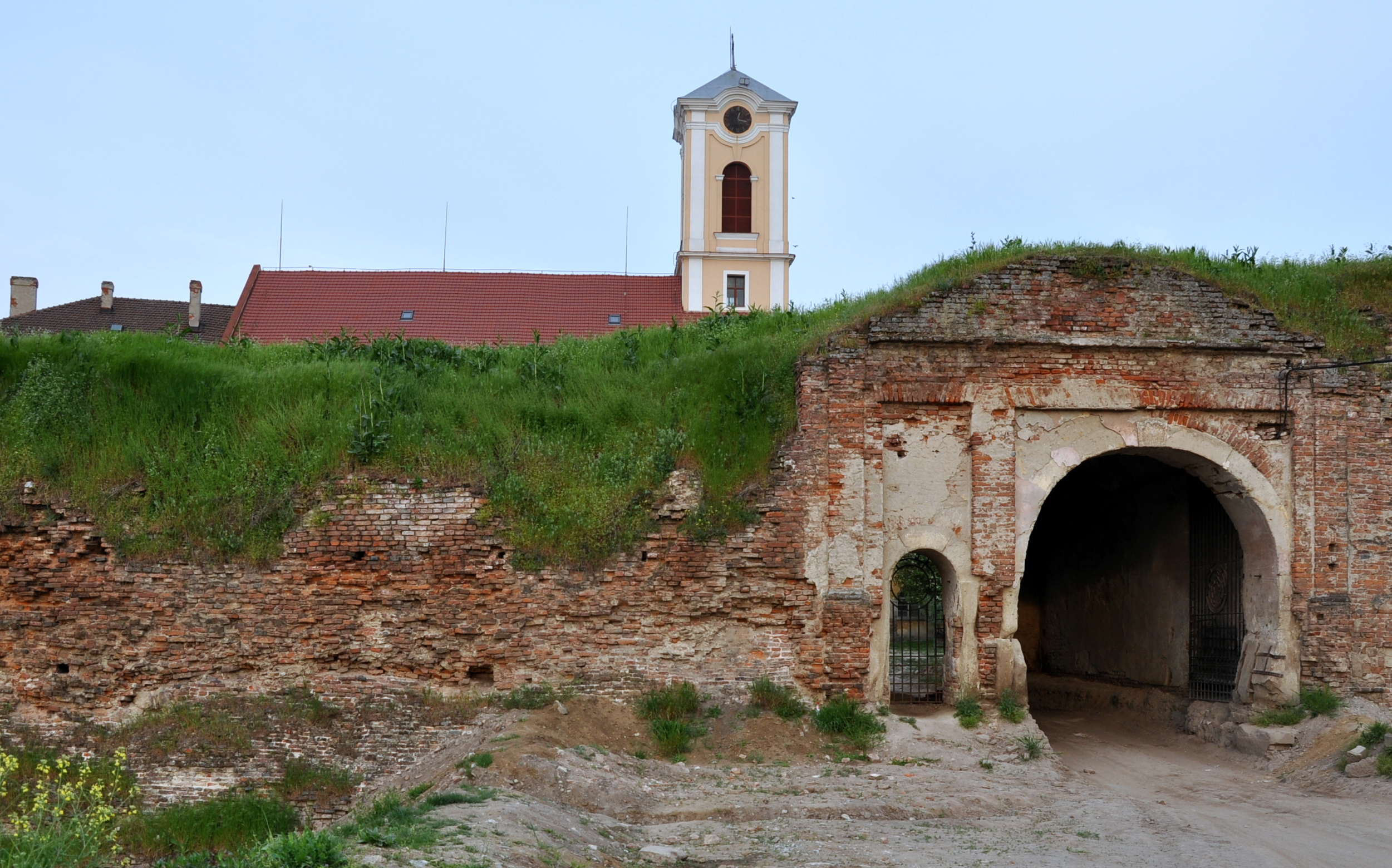 Cetatea Oradea